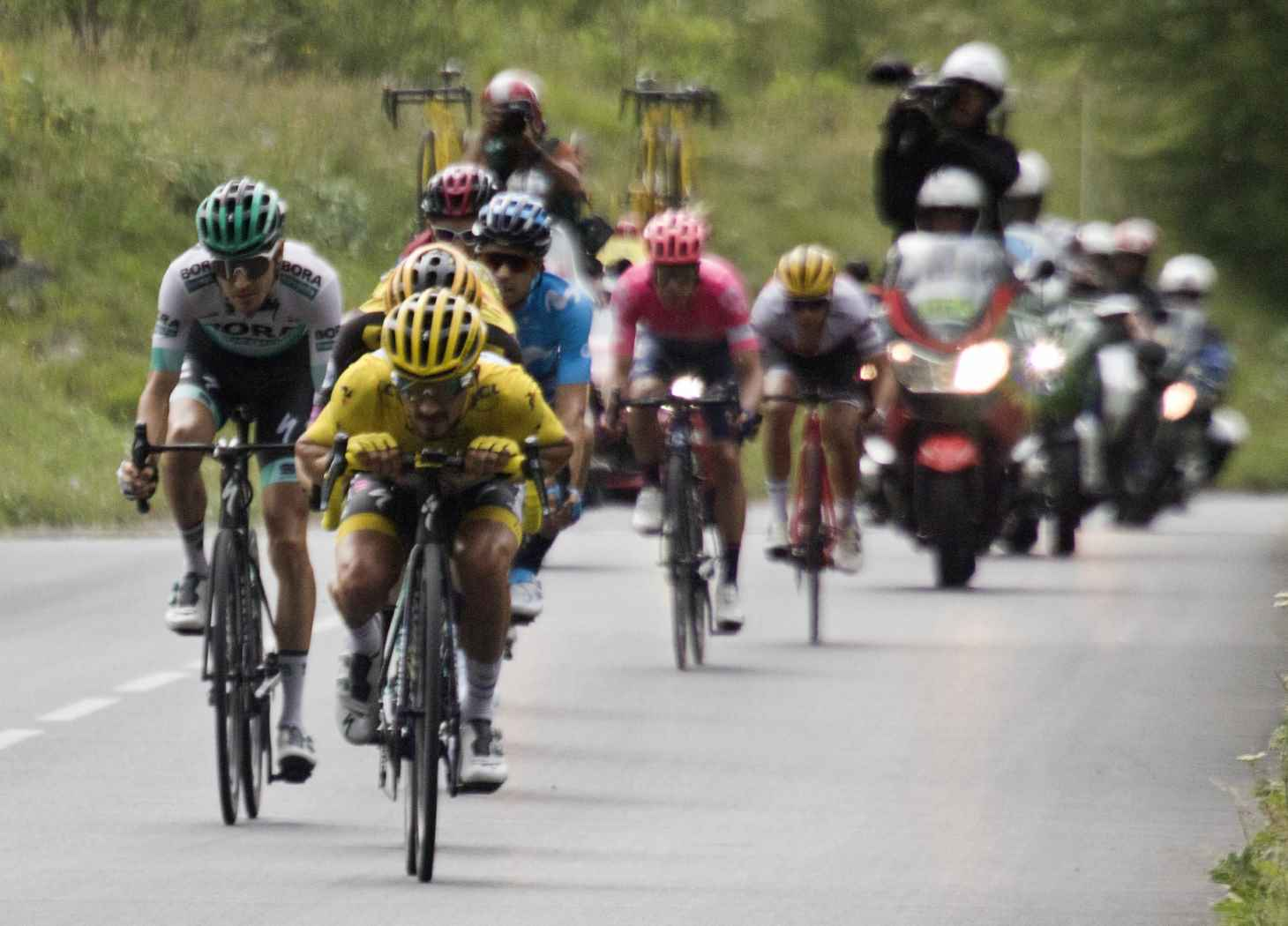 ALP10068 groep gele trui